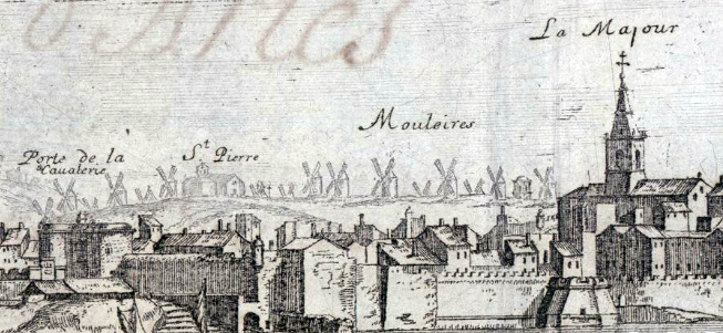 Vue d’Arles en 1660 (détail). Colline du Mouleyres avec ses moulins à vent ; à droite de l'image l'église ND de la Major.